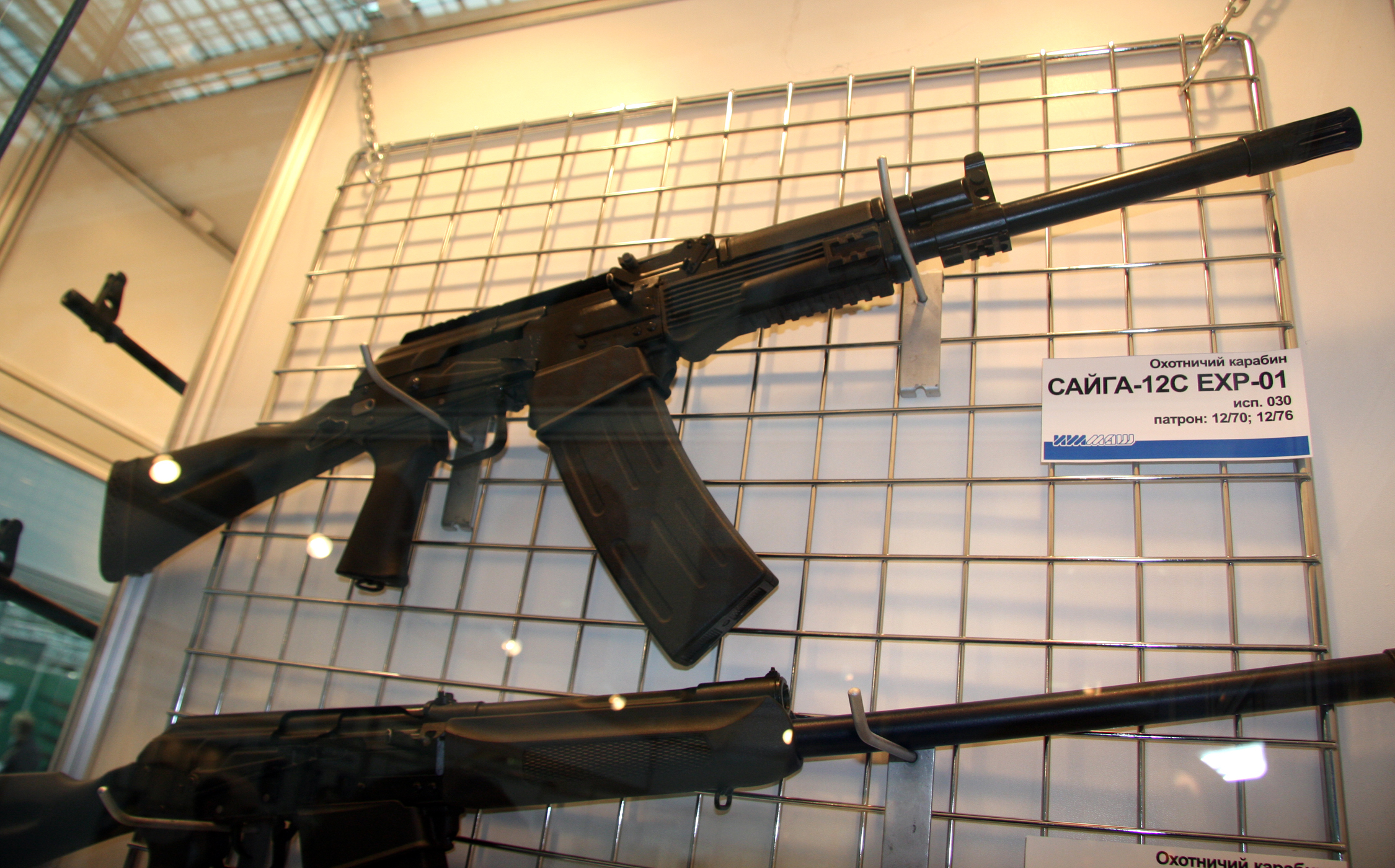 Стенд Ижмаша